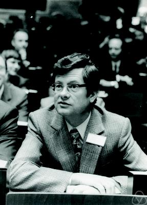 Foto di Kurt Leichtweiss